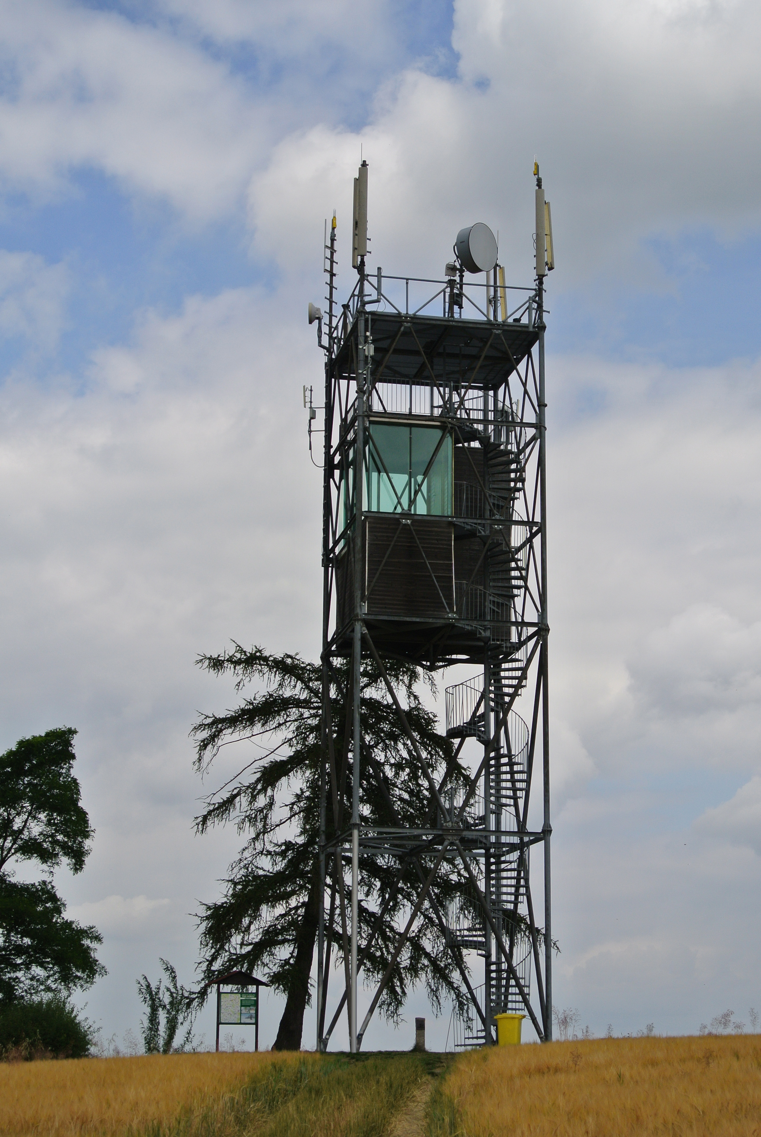 Rozhledna na Čermákově vrchu u Krátošic